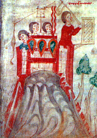 Obránci hradu